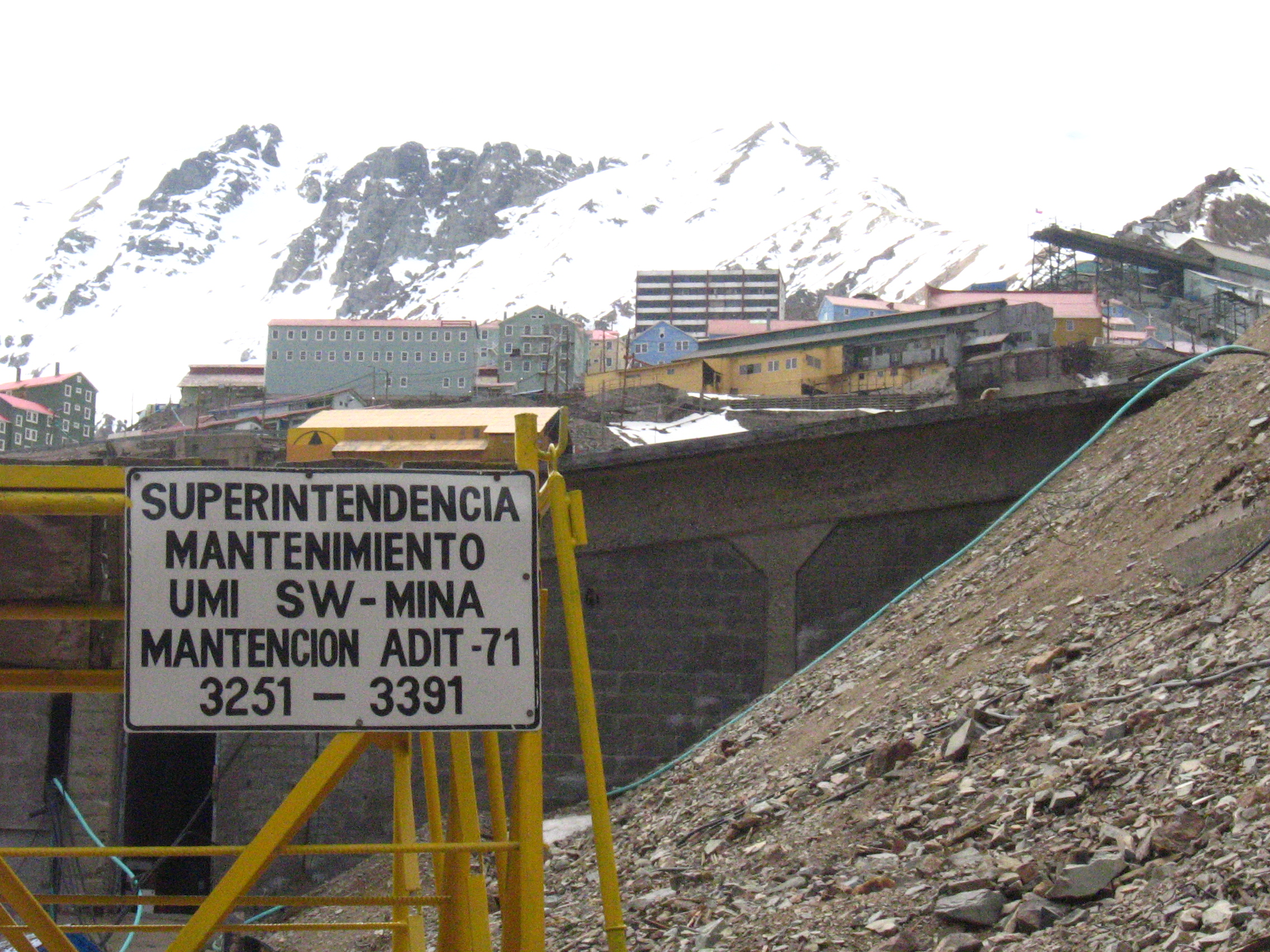 Detalle de Punta de Rieles, lugar donde vacía el Ferrocarril de Teniente 5